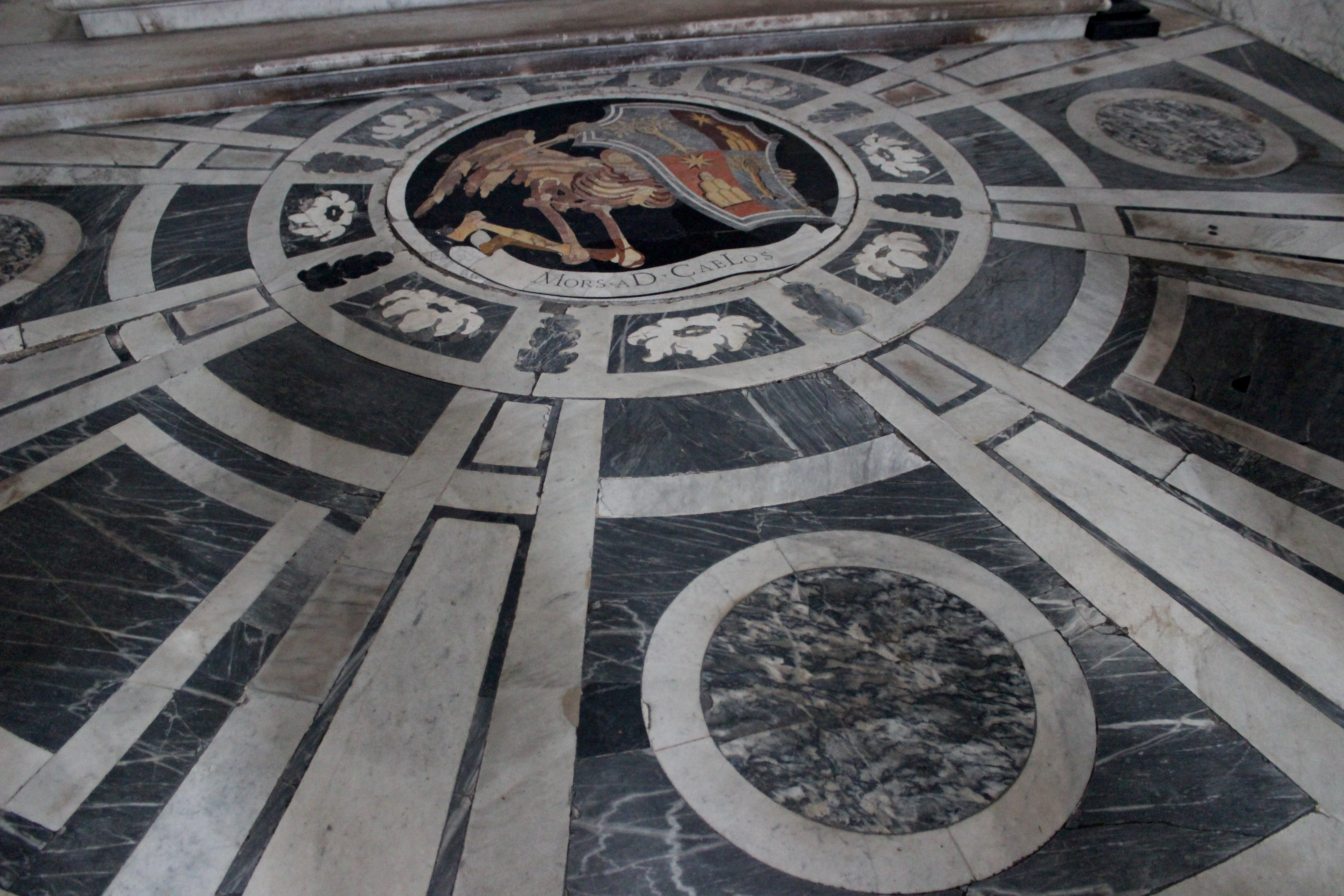 Roma. Santa Maria del Popolo. Capilla Chigi.